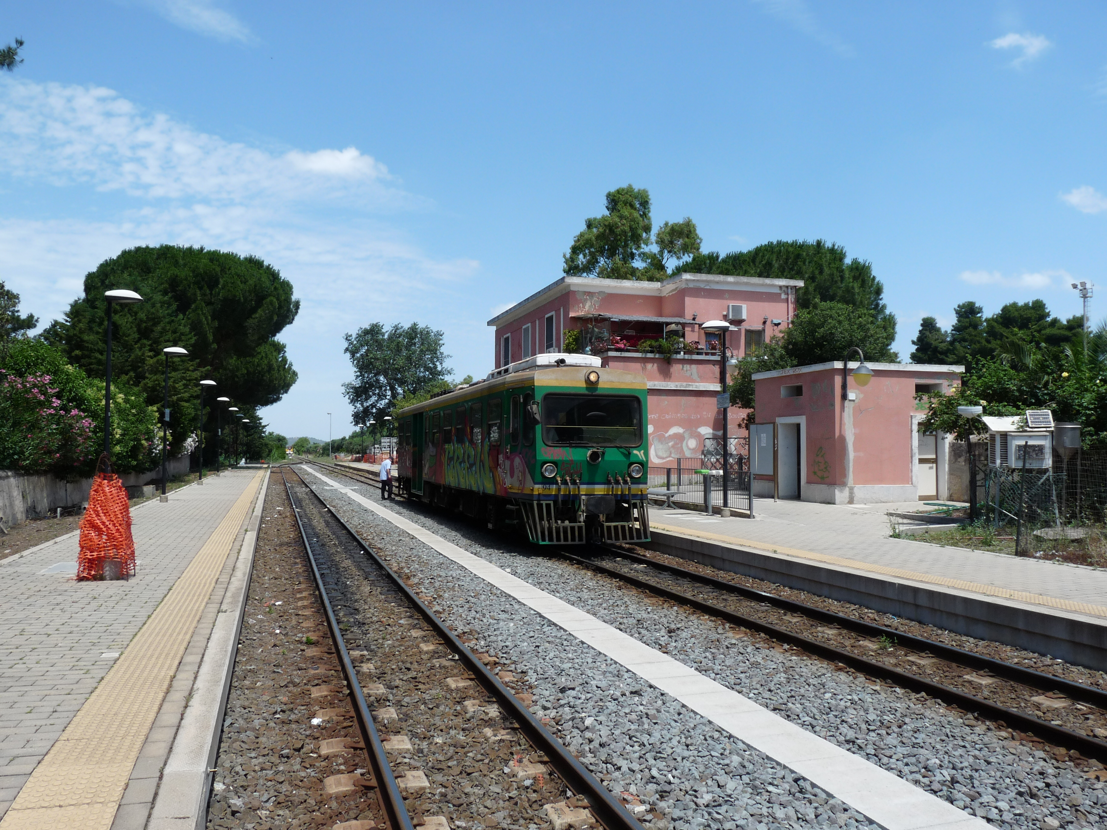 Trein in Dolianova station